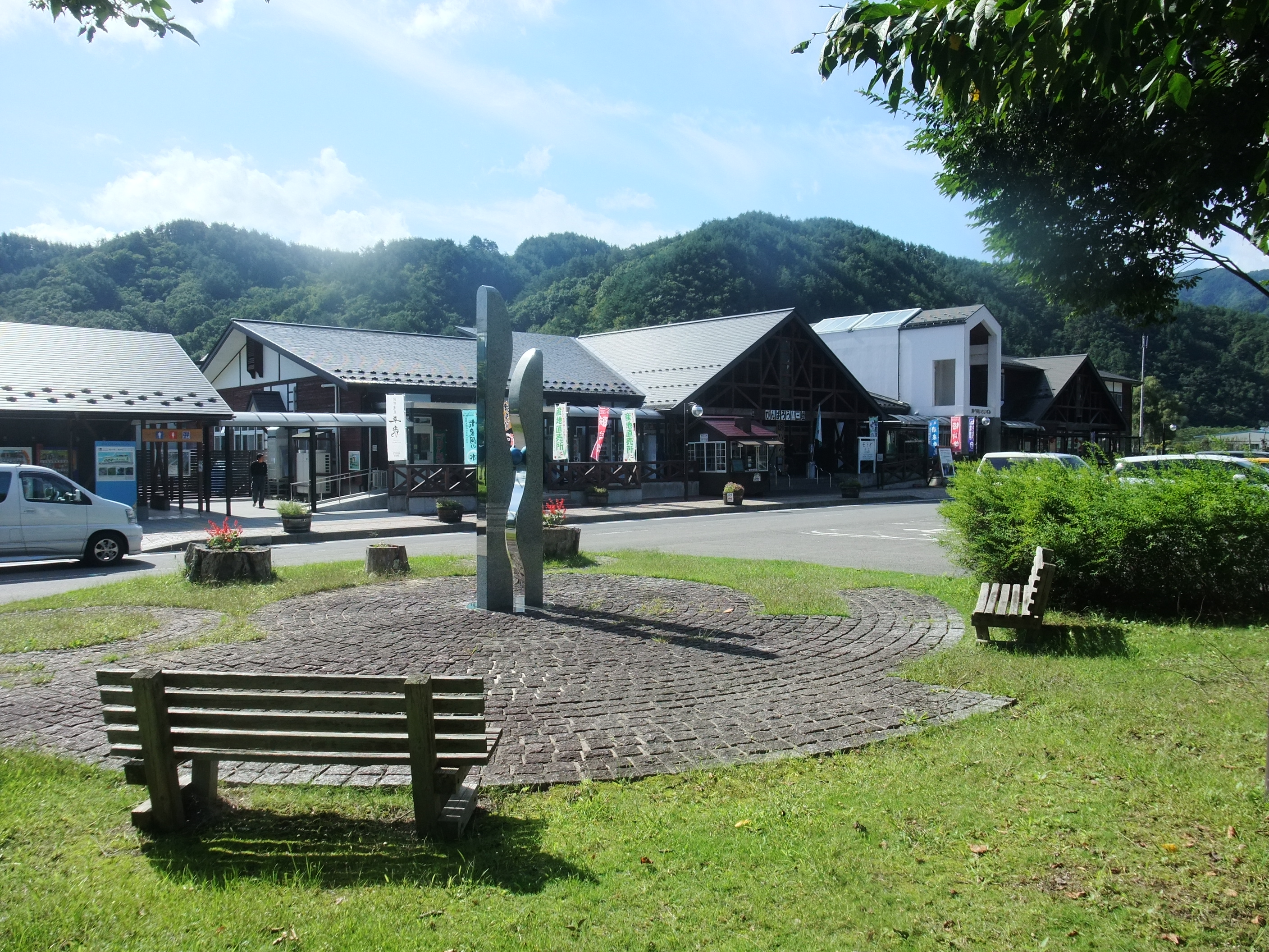 道の駅いわいずみ（国道455号）